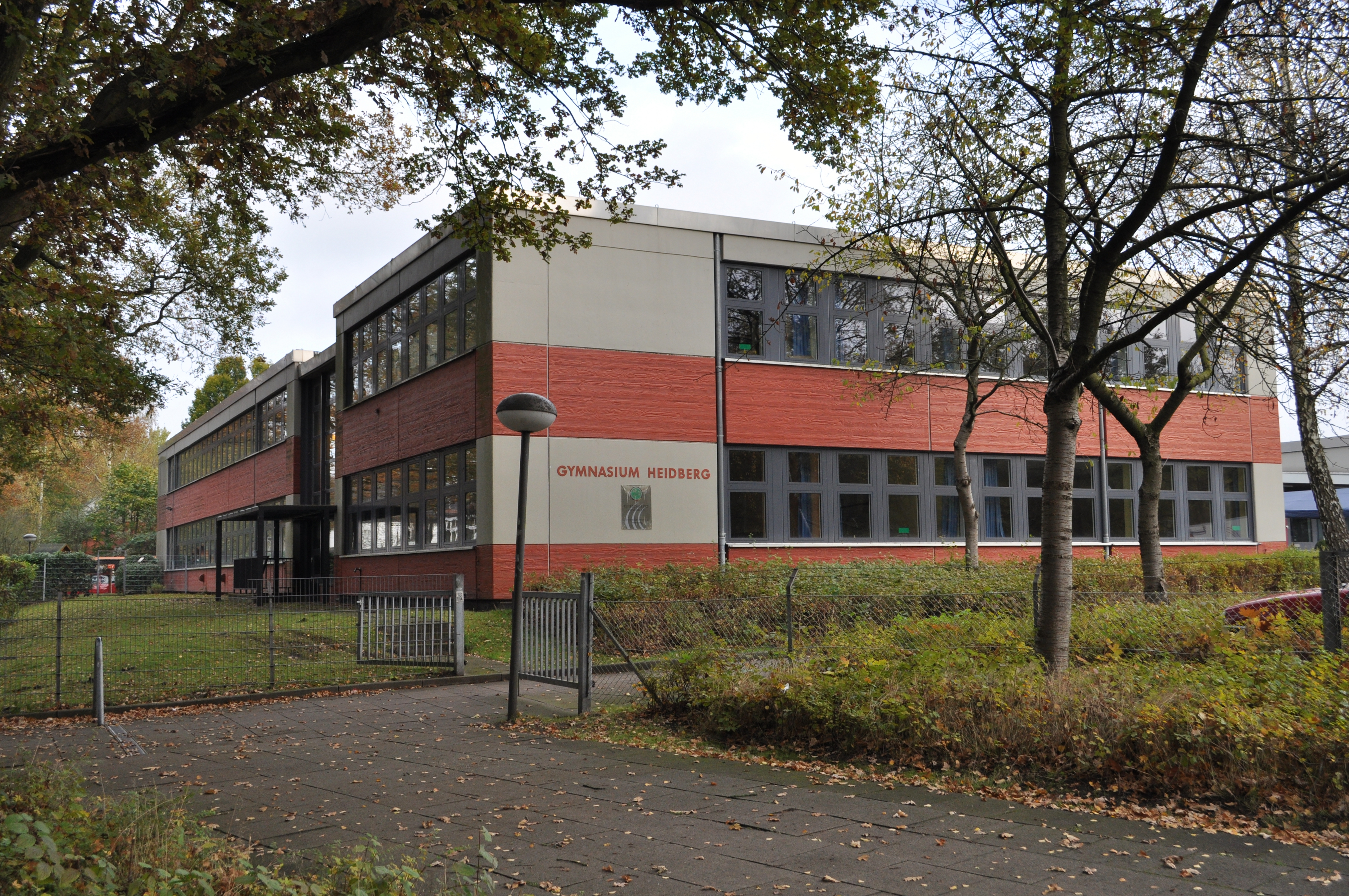 Gymnasium Heidberg in Hamburg-Langenhorn.